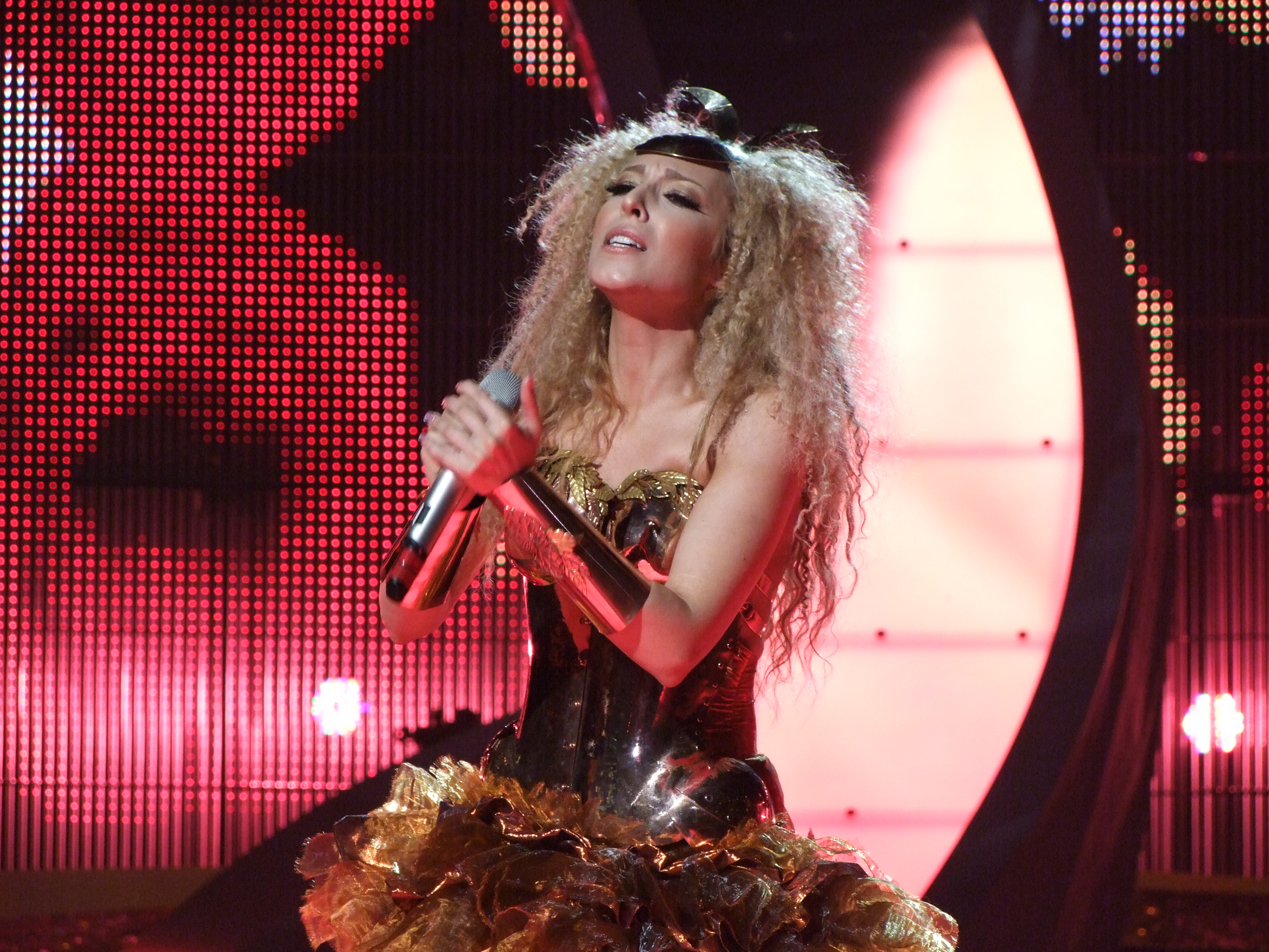 "CASANOVA" - Gisela - Andorra 2008